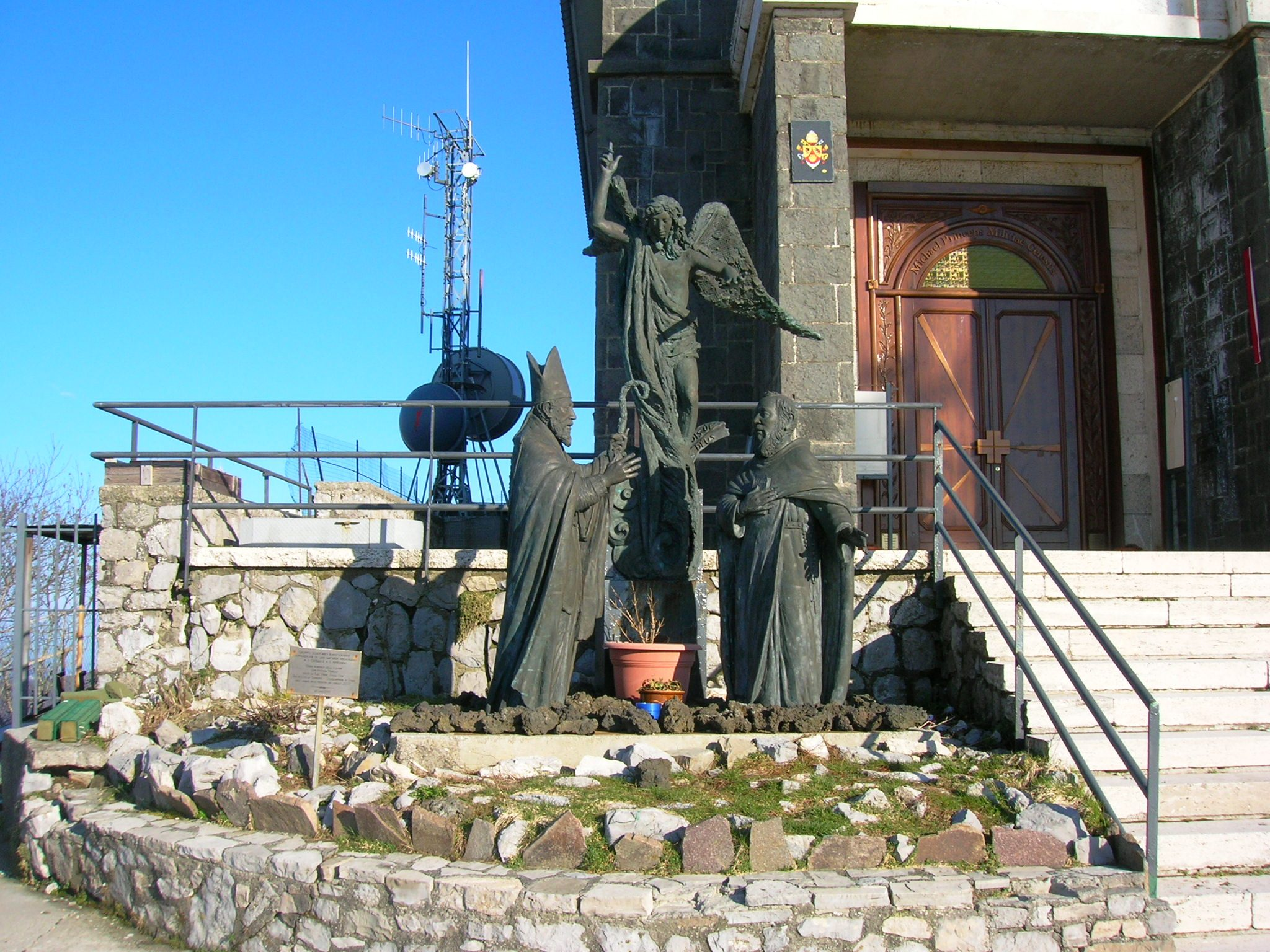 Raffigurazione dell'apparizione dell'arcangelo Michele ai santi Catello e Antonino